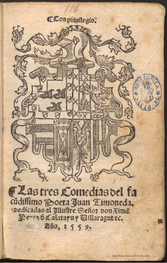 Comedias del poeta Juan Timoneda Título: Las tres Comedias del facūdissimo Poeta Juan Timoneda : dedicadas al Illustre Señor don Ximē Perez d̄ Calatayu y Villaragut etc Autor: Timoneda, Juan de ca. 1518-1583 Fecha de pub.: 1559